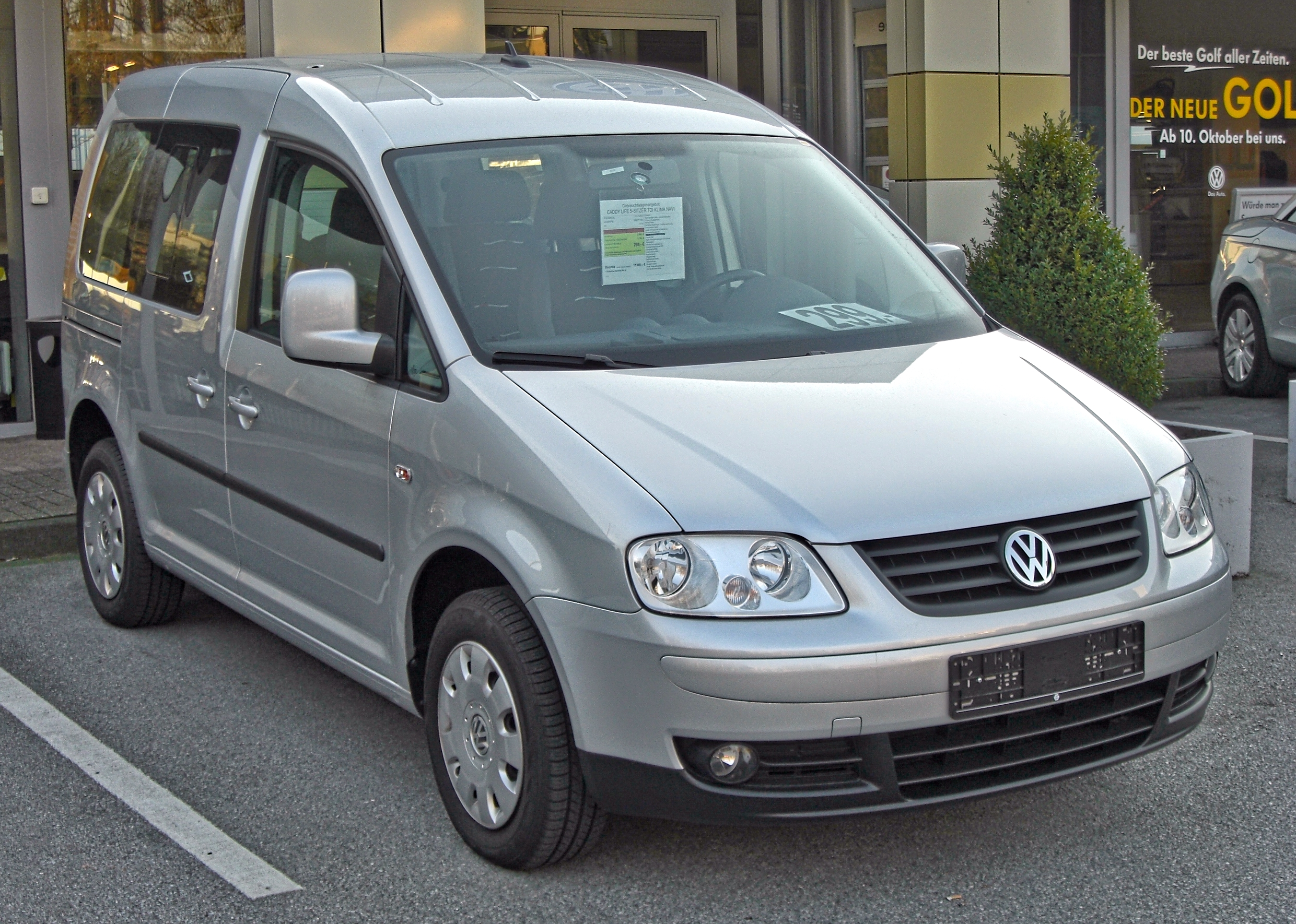 VW Caddy Life